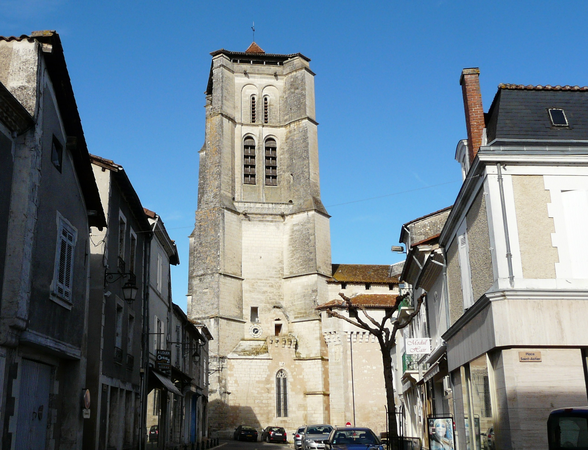 Le clocher massif de l'église Saint-Astier, Saint-Astier, Dordogne, France Object location 45° 8′ 45.90″ N, 0° 31′ 46.70″ E This and other images at their locations on: Google Maps - Google Earth - OpenStreetMap - Proximityrama(Info)